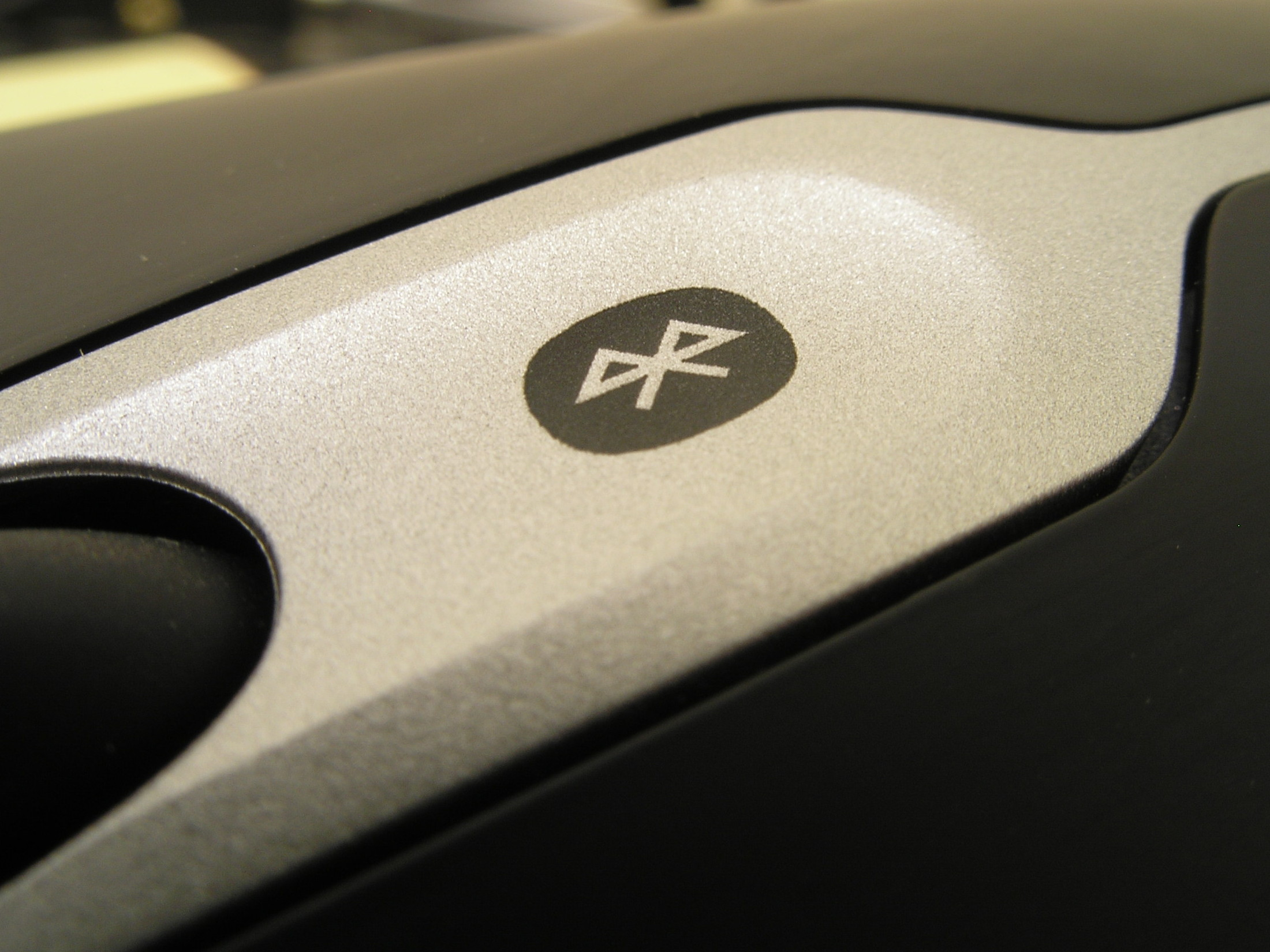 Bluetooth-Logo auf einer Maus (Dell BT/XPS M2010) – seitlich